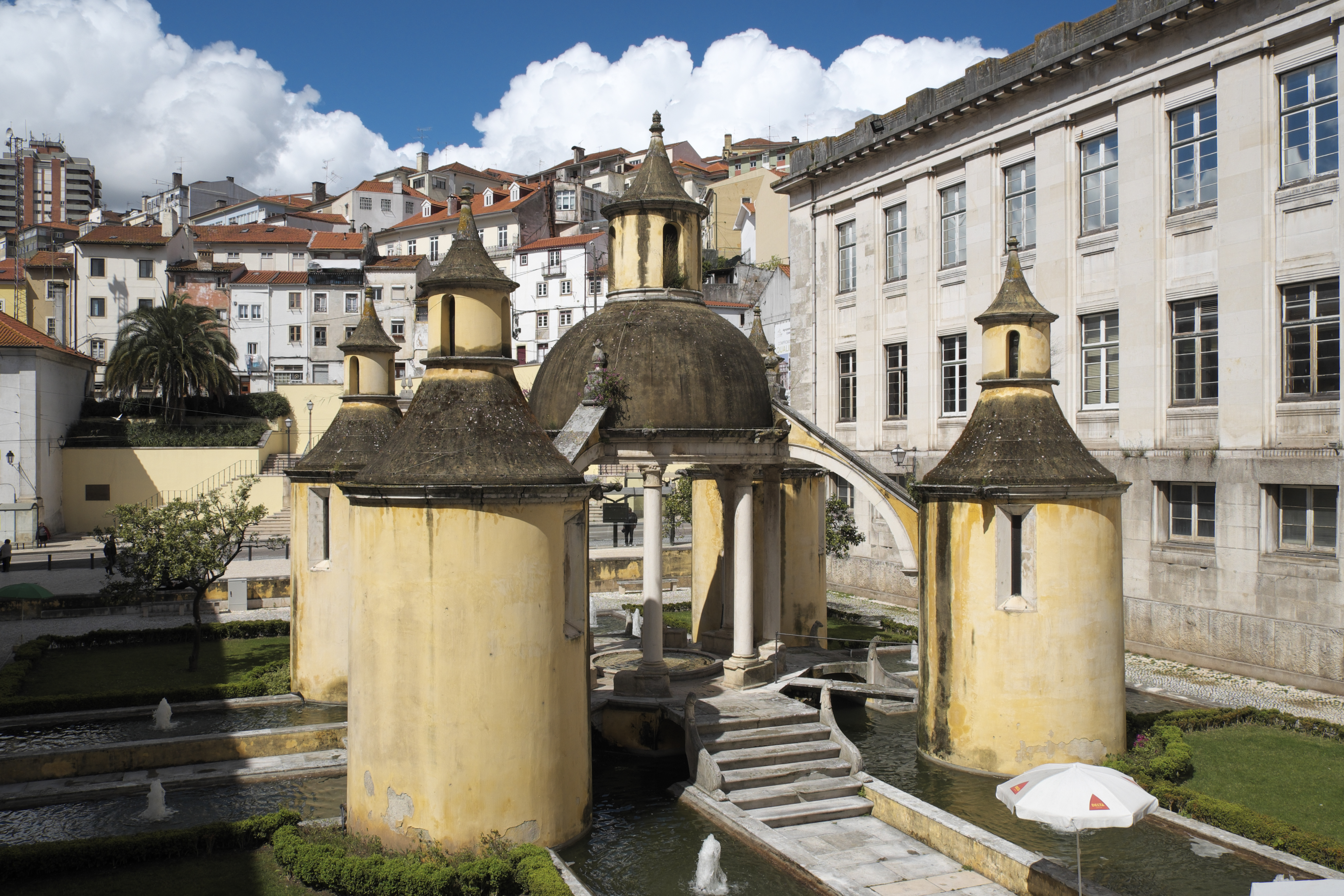 Jardim da Manga, auch Claustro da Manga, zweiter Kreuzgang des ehemaligen Augustinerchorherrenstifts Santa Cruz in Coimbra (Portugal)